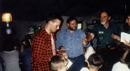 Woplfgang Hegemeister im deutsch-russischen Jugendlager 1995